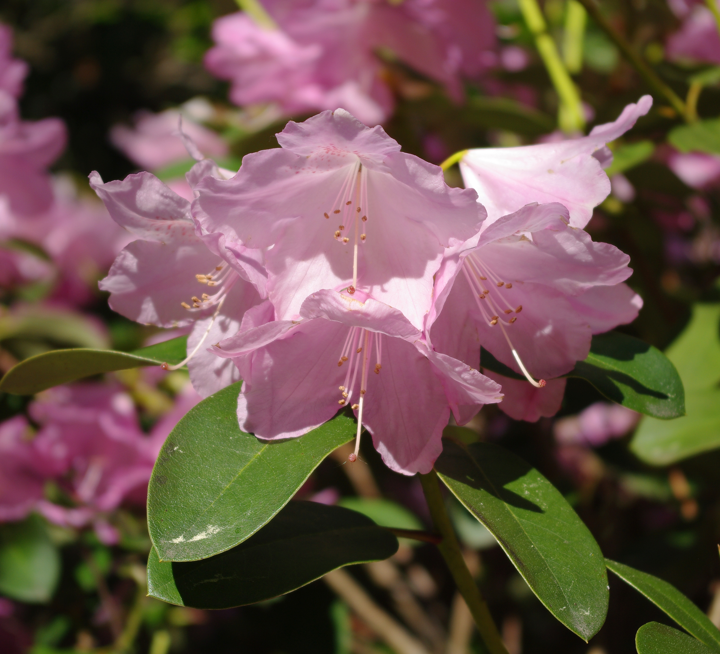 Rhododendron williamsianum-hybrid